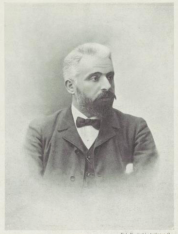 Architetto Sebastiano Locati (1862-1939).